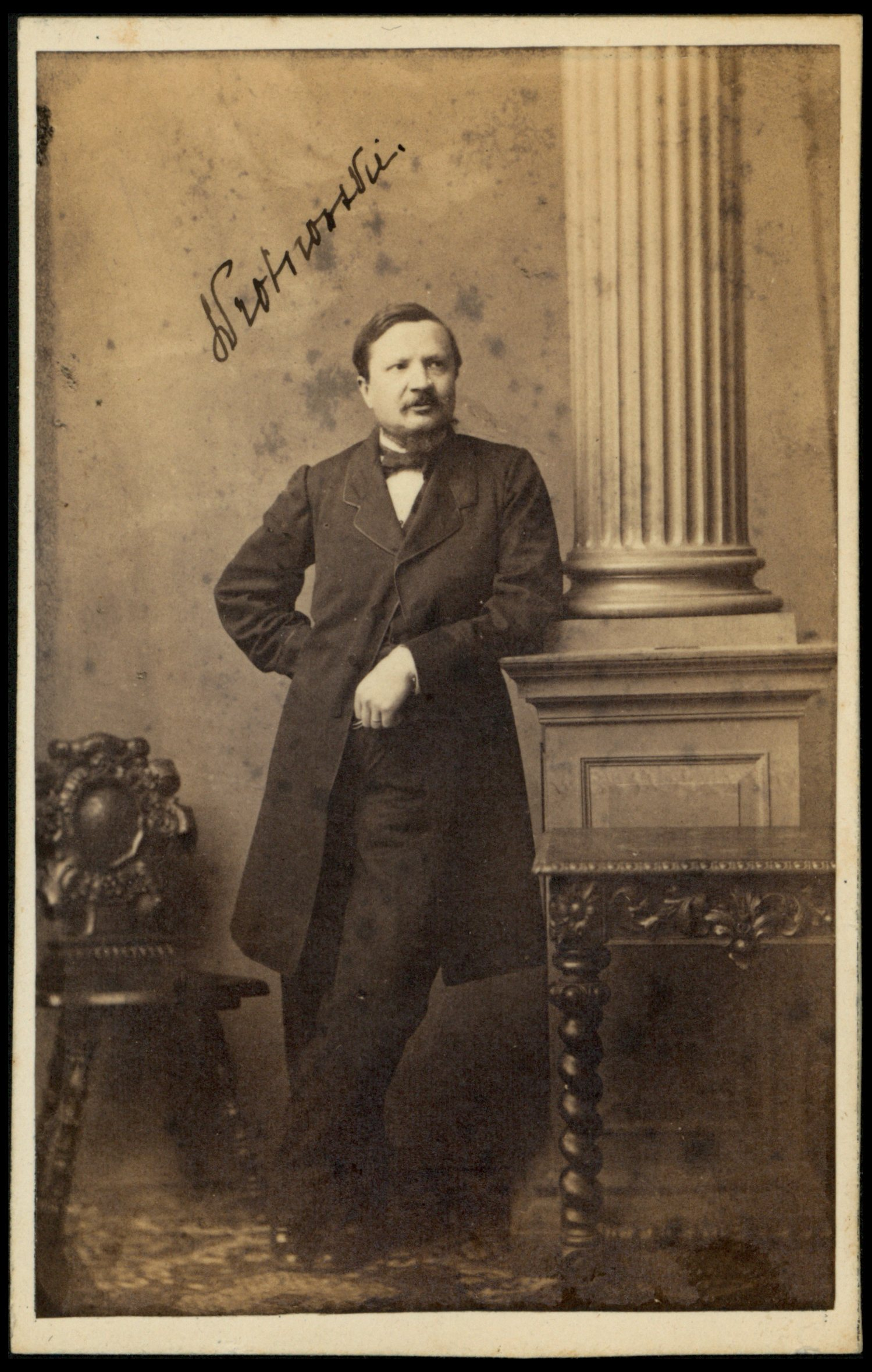 Antoni Wrotnowski, ok. 1863 r.